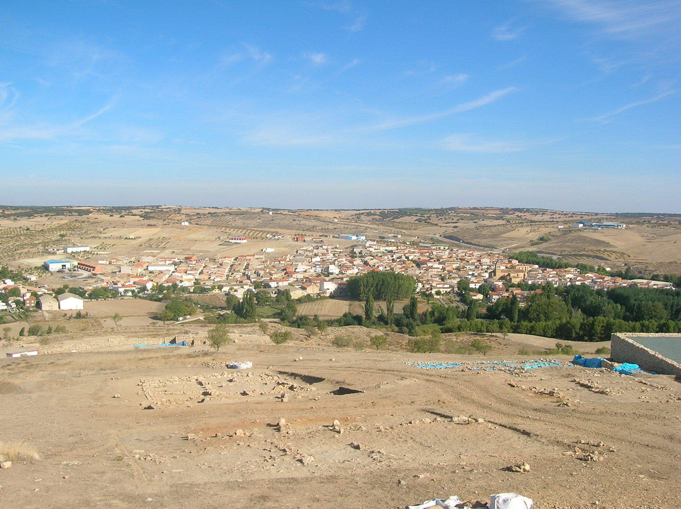 Panorámica general de ciudsad ibero-romana de Libisosa y la Villa de Lezuza (Albacete, España)